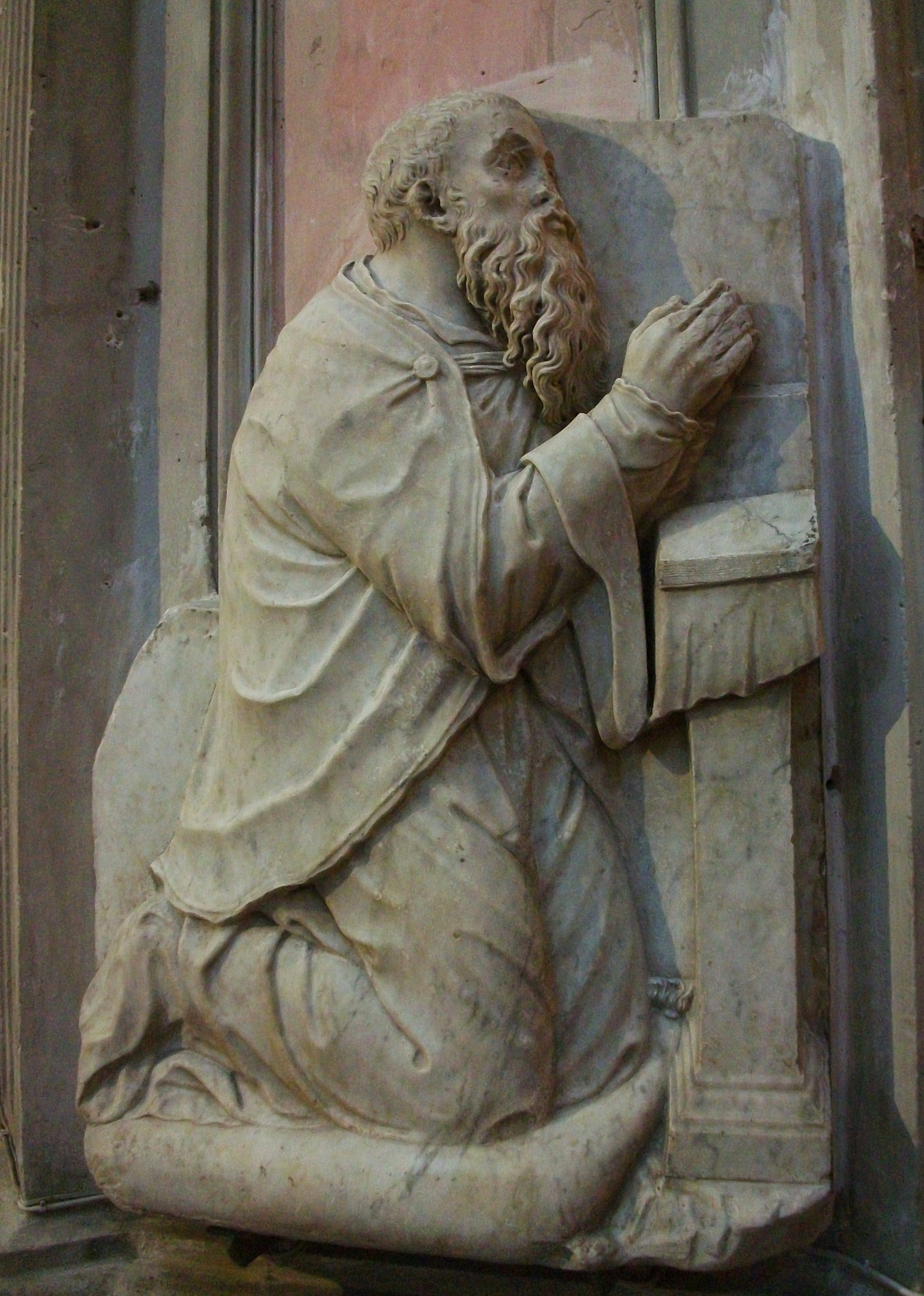 Sepulcre de Francesc Llançol de Romaní (mort el 1544) a l'església del Temple, València. Mig relleu amb la figura d'aquest mestre de l'Orde de Montesa, de marbre i traça italiana, procedent del castell de Montesa en l'actualitat es troba a l'església del Temple de la ciutat de València.